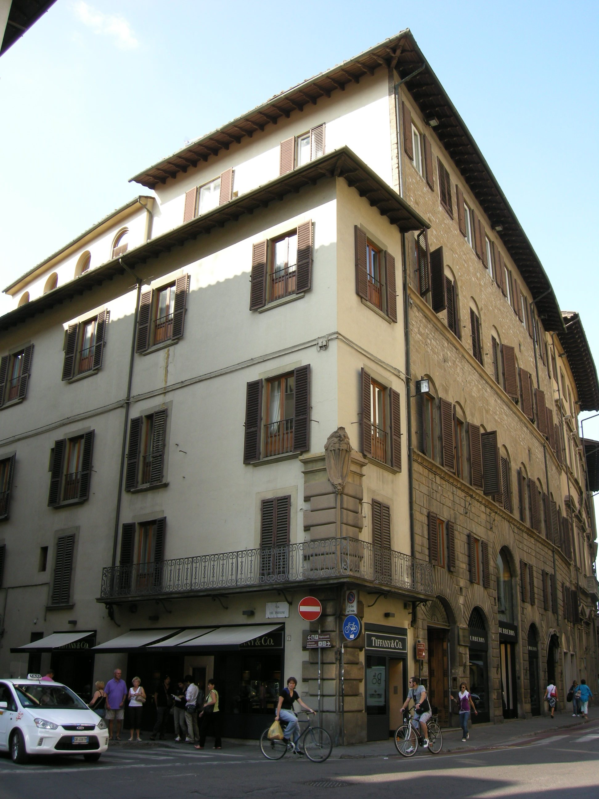 Palazzo minerbetti